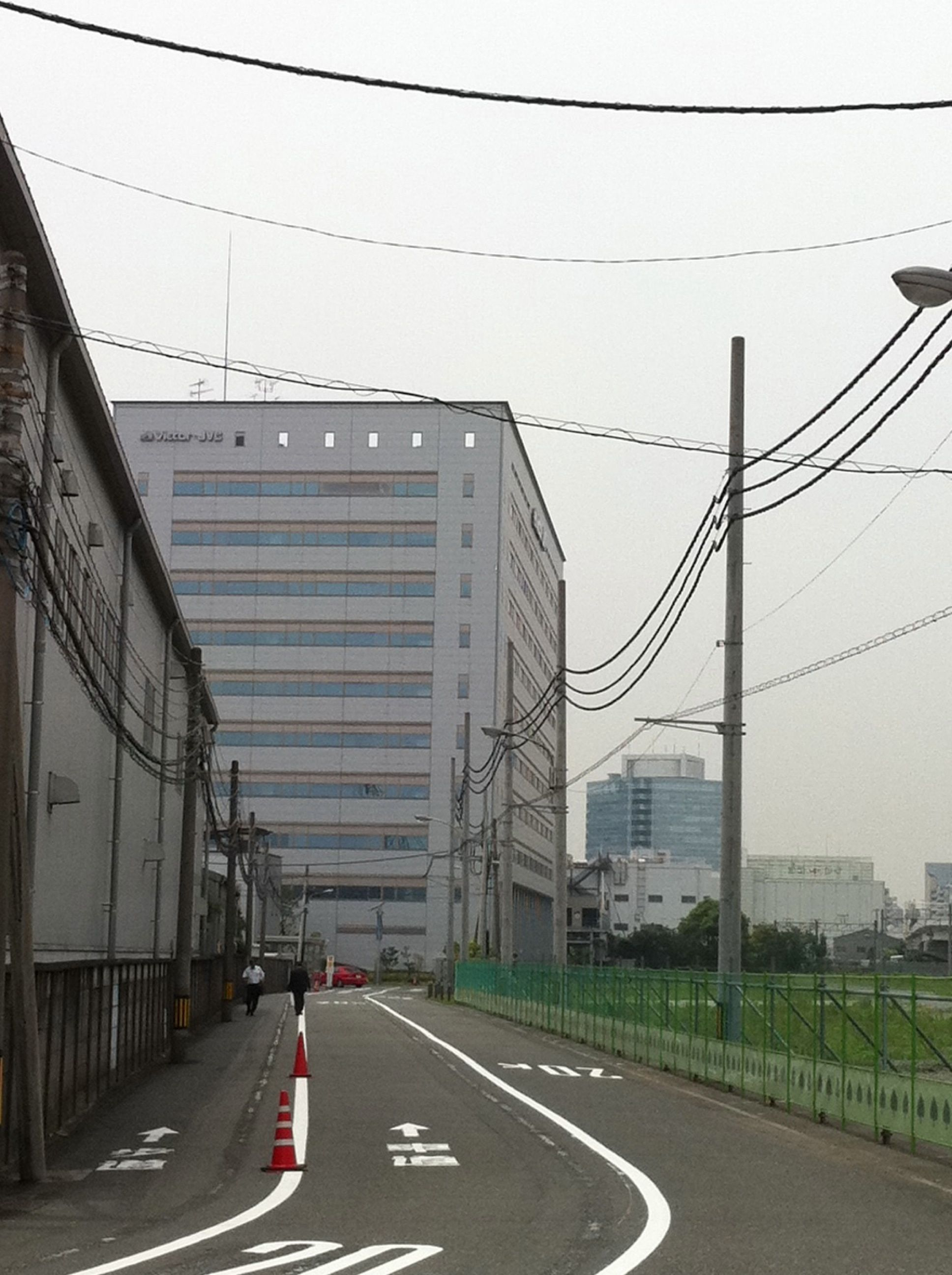 JVCケンウッド本社